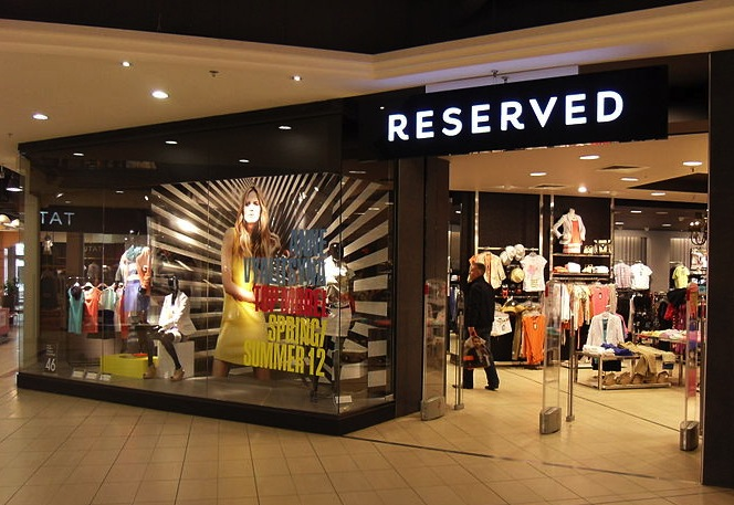 Reserved salon odzieżowy w Centrum Handlowym Alfa Centrum. Gdańsk Przymorze.